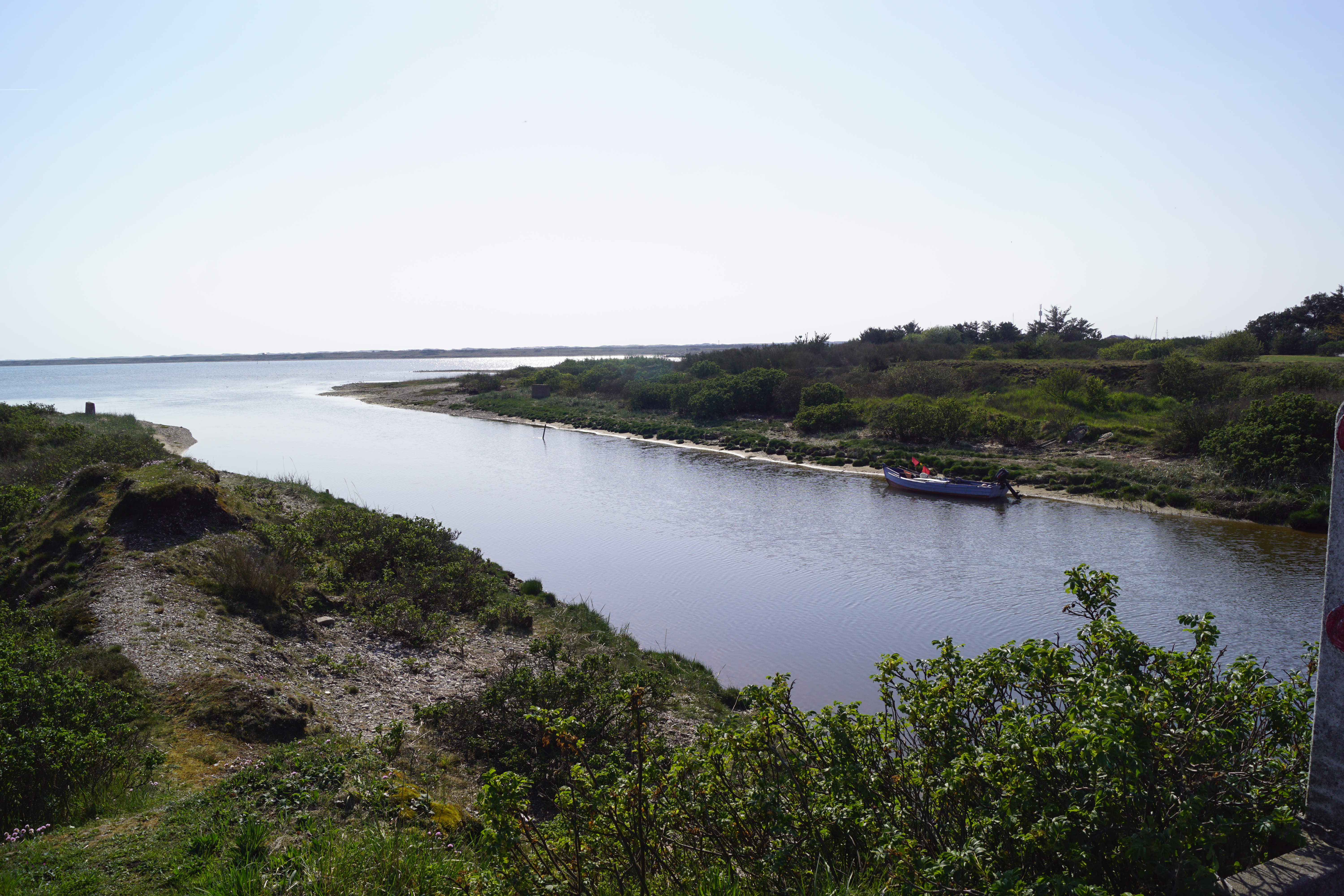 Kastet Å er den nederste del af Hvidbjerg Åsystemet